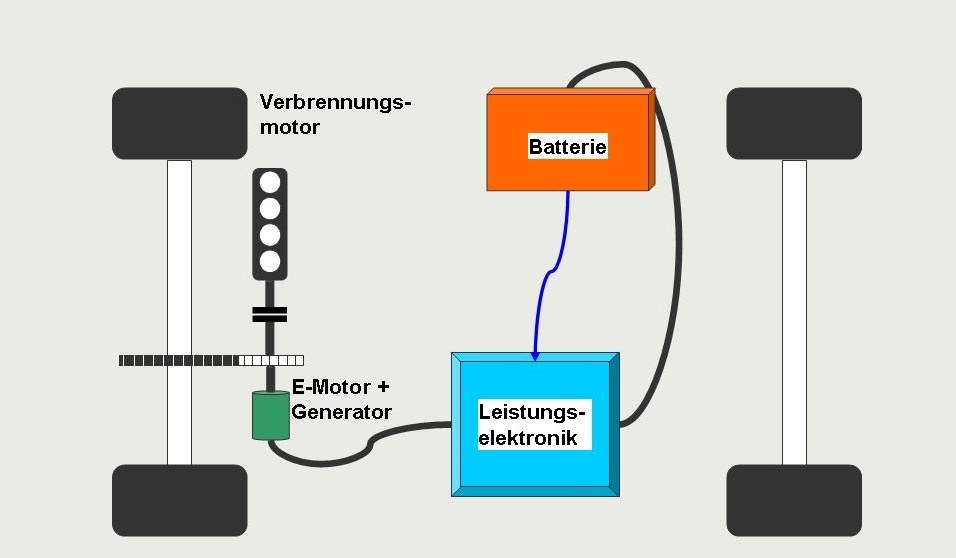 Systemstruktur eines parallelen Hybridantriebs